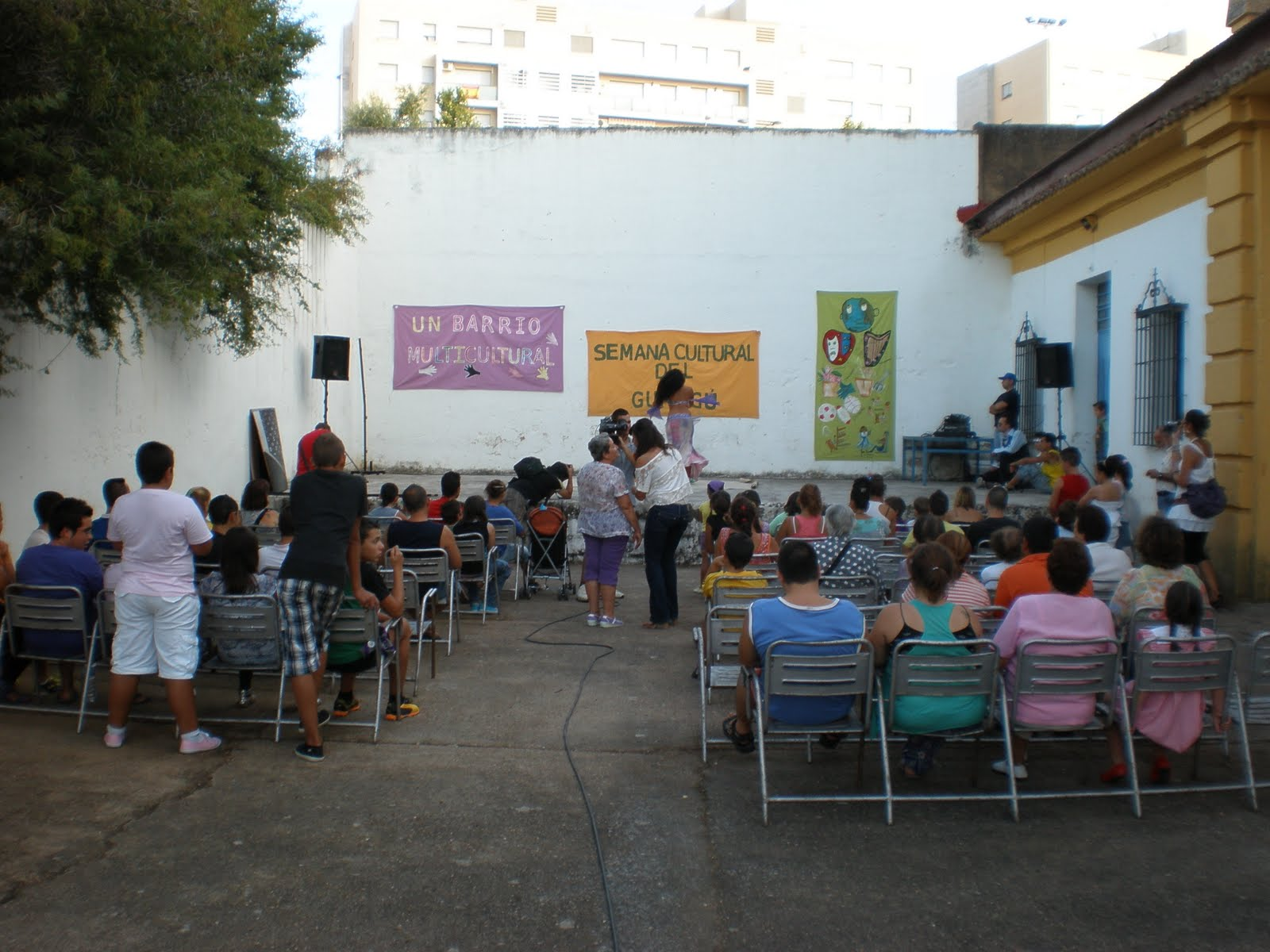 Actuaciones en "El Corralón de la Iglesia" dentro de la Semana Cultural de El Gurugú de 2010.